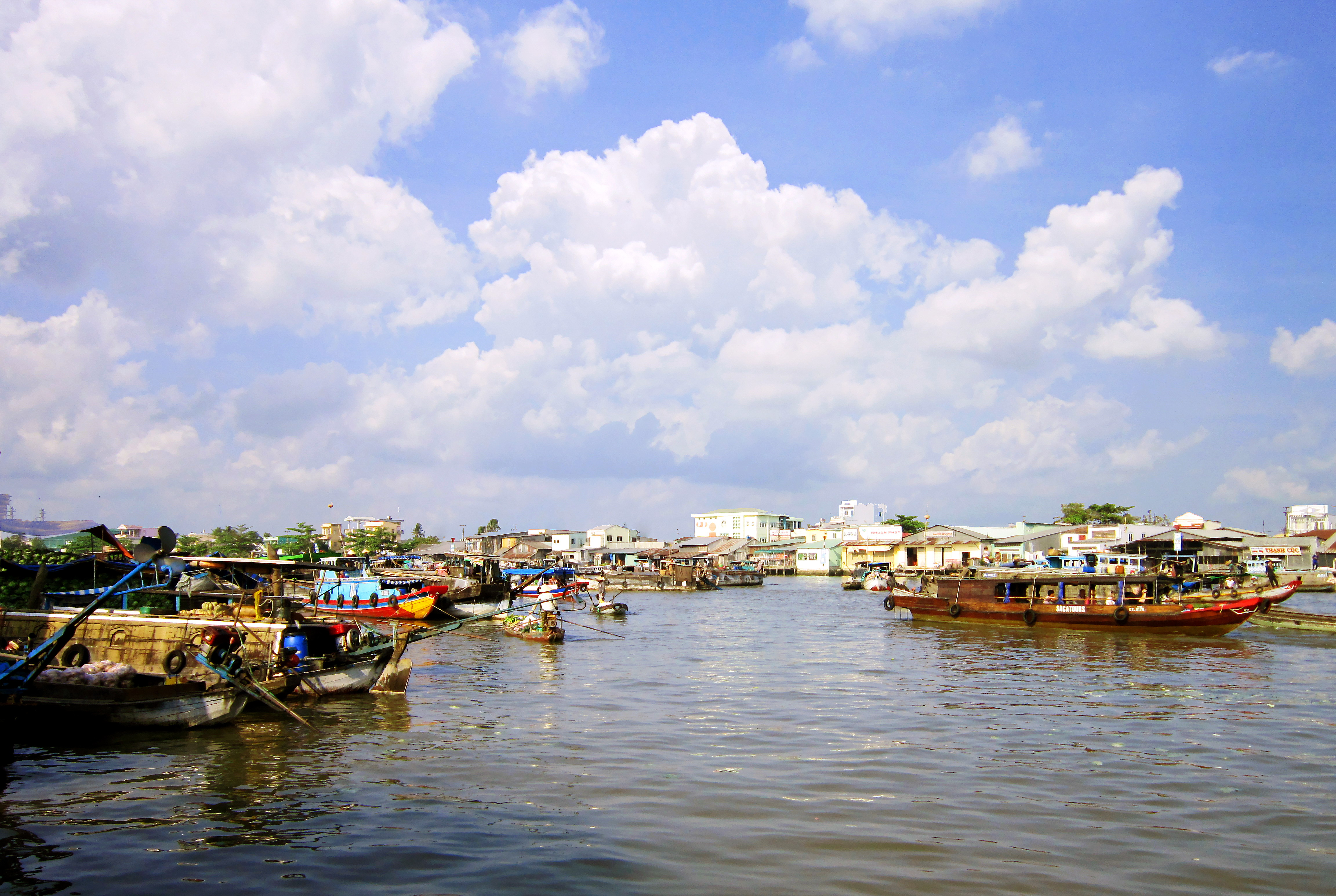 Một cảnh ở chợ nổi Cái Răng, Cần Thơ, Việt Nam.